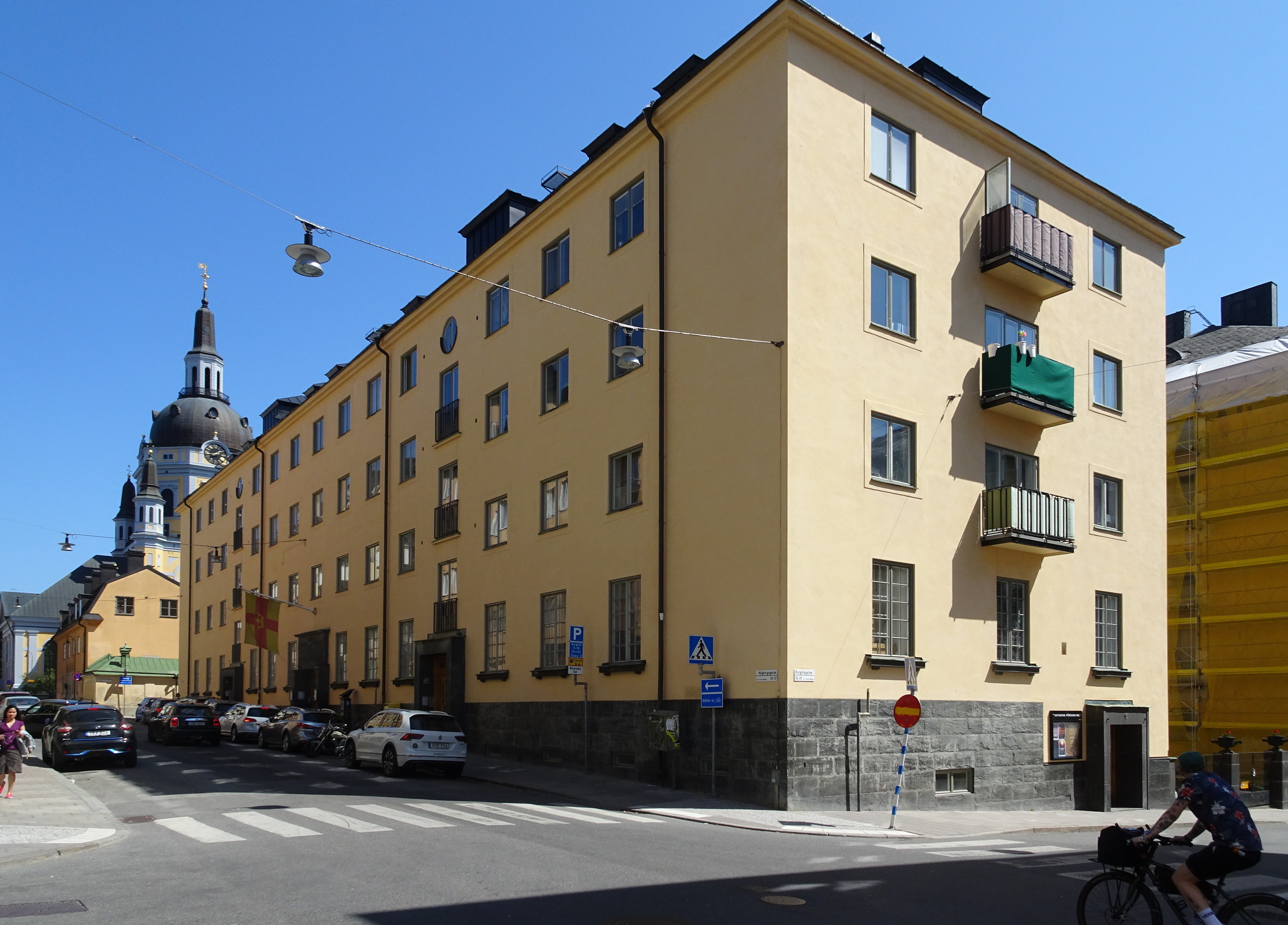 Katarina församlingshus, fastigheten Sturen mindre 10, byggd 1933-1935, Erik Swedlund (Arkitekt)